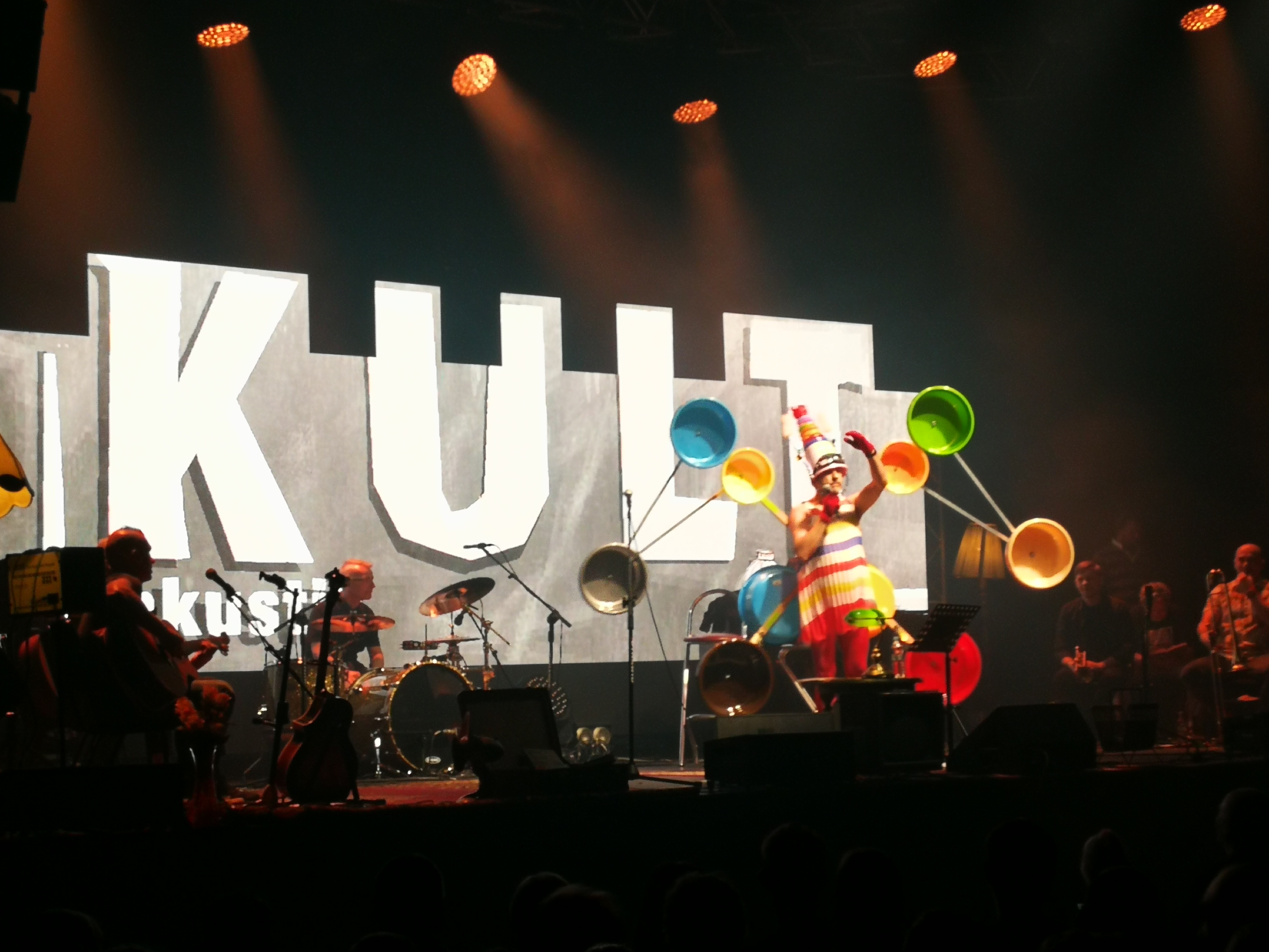 Mirosław Jędras (Zacier) podczas koncertu Kultu w klubie Wytwórnia w Łodzi (1 lutego 2019).